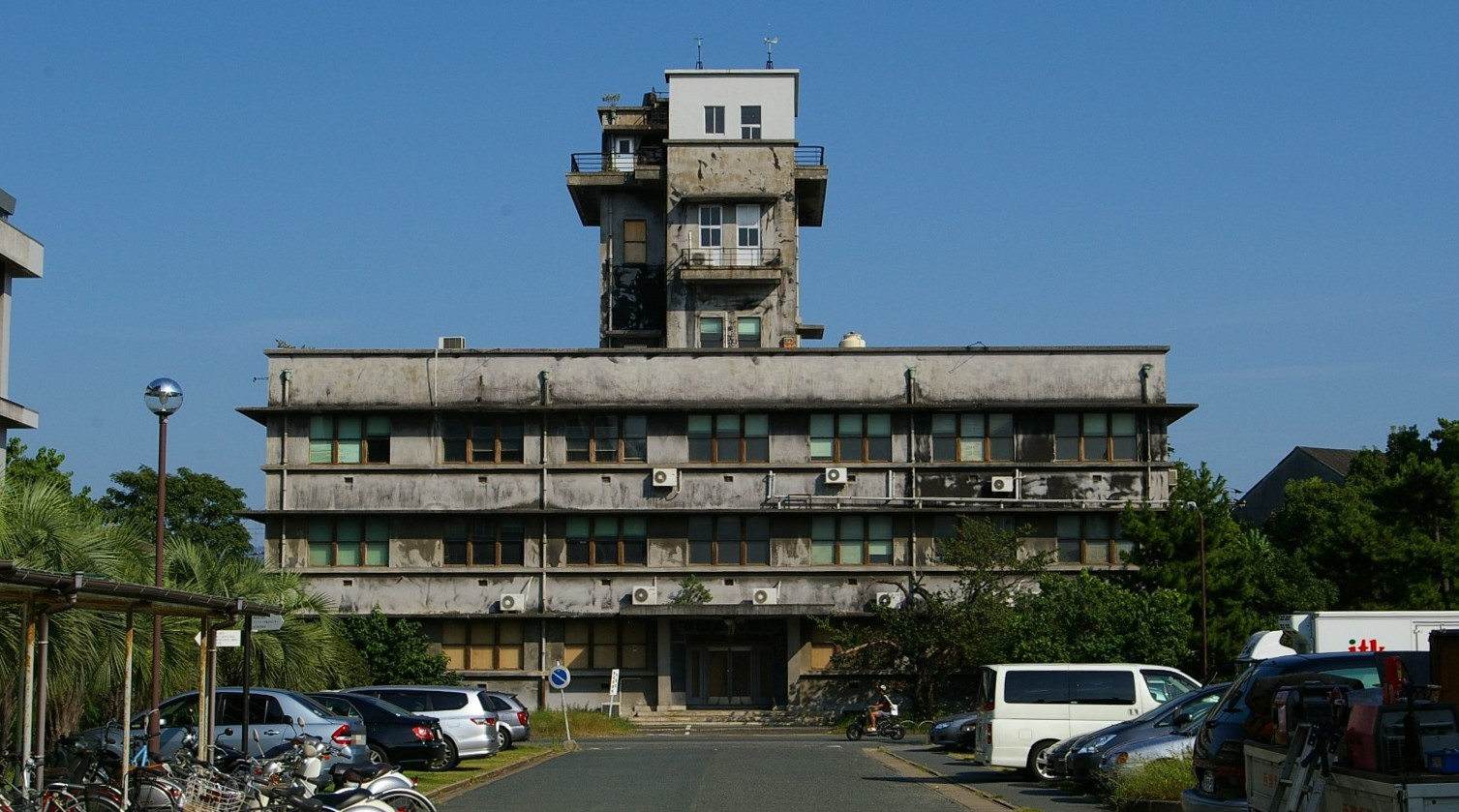 福岡